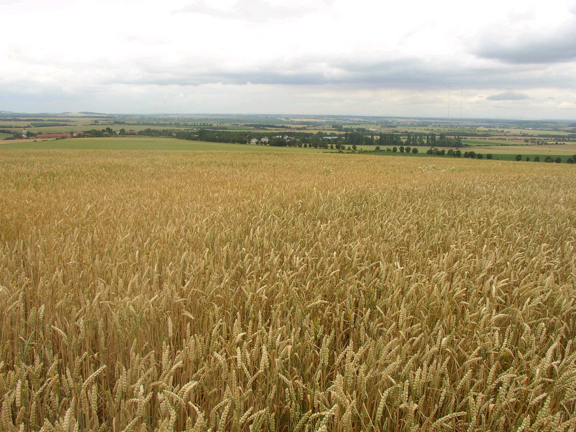 Lipanské bojiště - pohled od mohyly k severozápadu. Hlavní část bitvy se odehrála na severním úbočí Lipské hory, tedyv prostoru západně a jihozápadně od vesnice Lipany, přibližně v místech dnešní silnice Lipany-Hřiby, tedy v popředí a při pravé části obrázku. Zmíněná silnice, lemovaná stromy, je dobře patrná vpravo za obilným polem. Za stromy uprostřed se nachází ves Hřiby, dále k jz. (doleva) Vitice. Vzadu na obzoru se rýsují liblické vysílače a Český Brod. vyfotografováno: červenec 2004 / July 2004 fotograf: Miaow Miaow